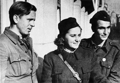 Мира Алечковић, Бранко Ћопић и Блажо Конески у партизанима (око 1944). Уступио Срђа Николић, син Мире Алечковић.